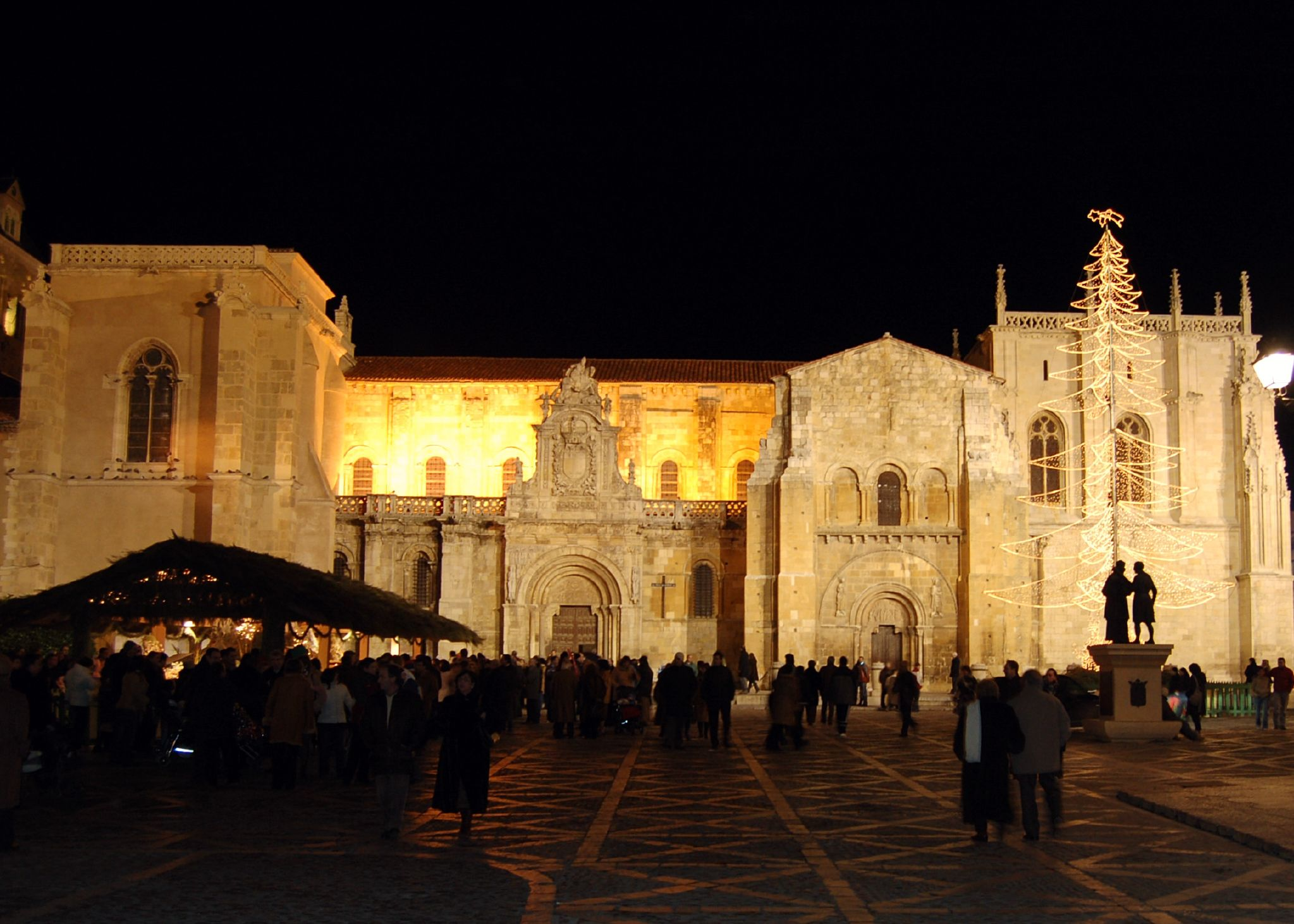 Basílica de San isidoro de noche.